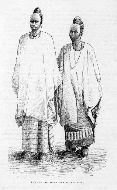 Femmes toucouleures du Boundou (Sénégal), illustration dans Côte occidentale d'Afrique, 1890, du Colonel Frey, [Pl. en reg. p.56 :] [Cote : Réserve A 200 386]